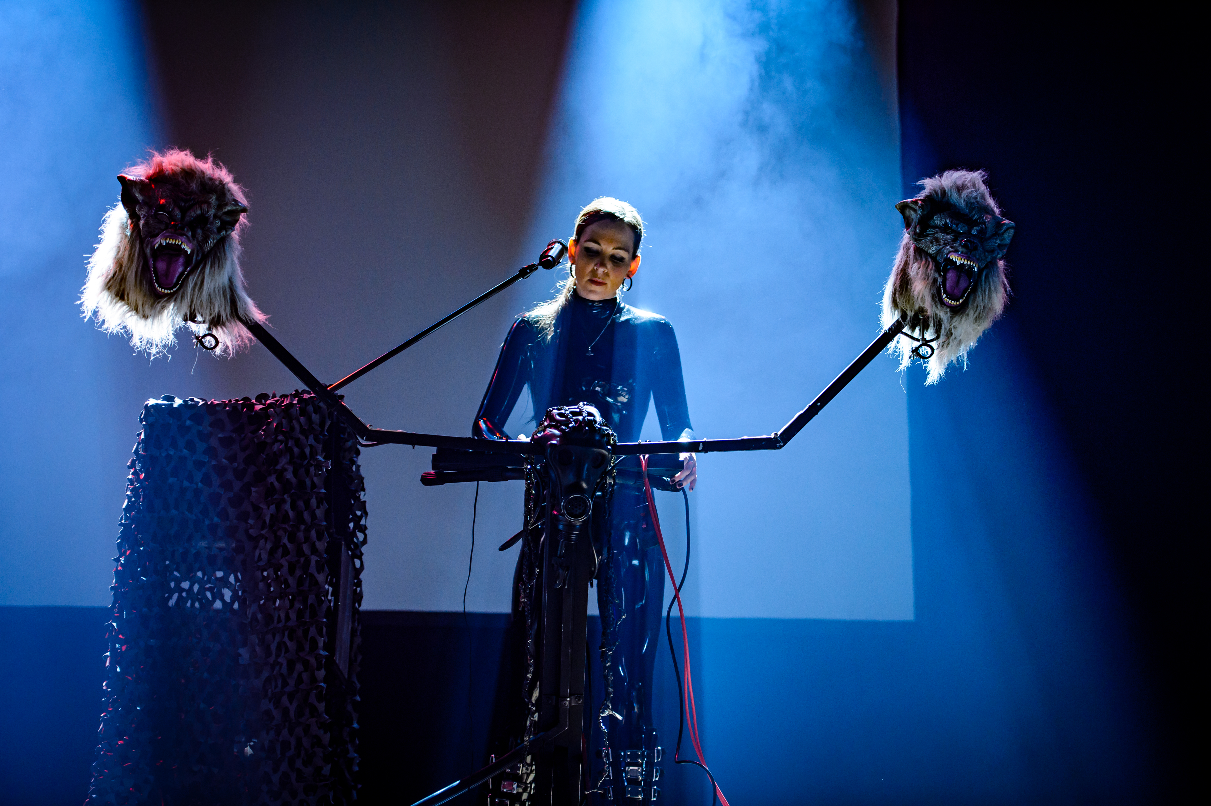 'E-Tropolis Festival 2017; Oberhausen Turbinenhalle': 'Centhron'